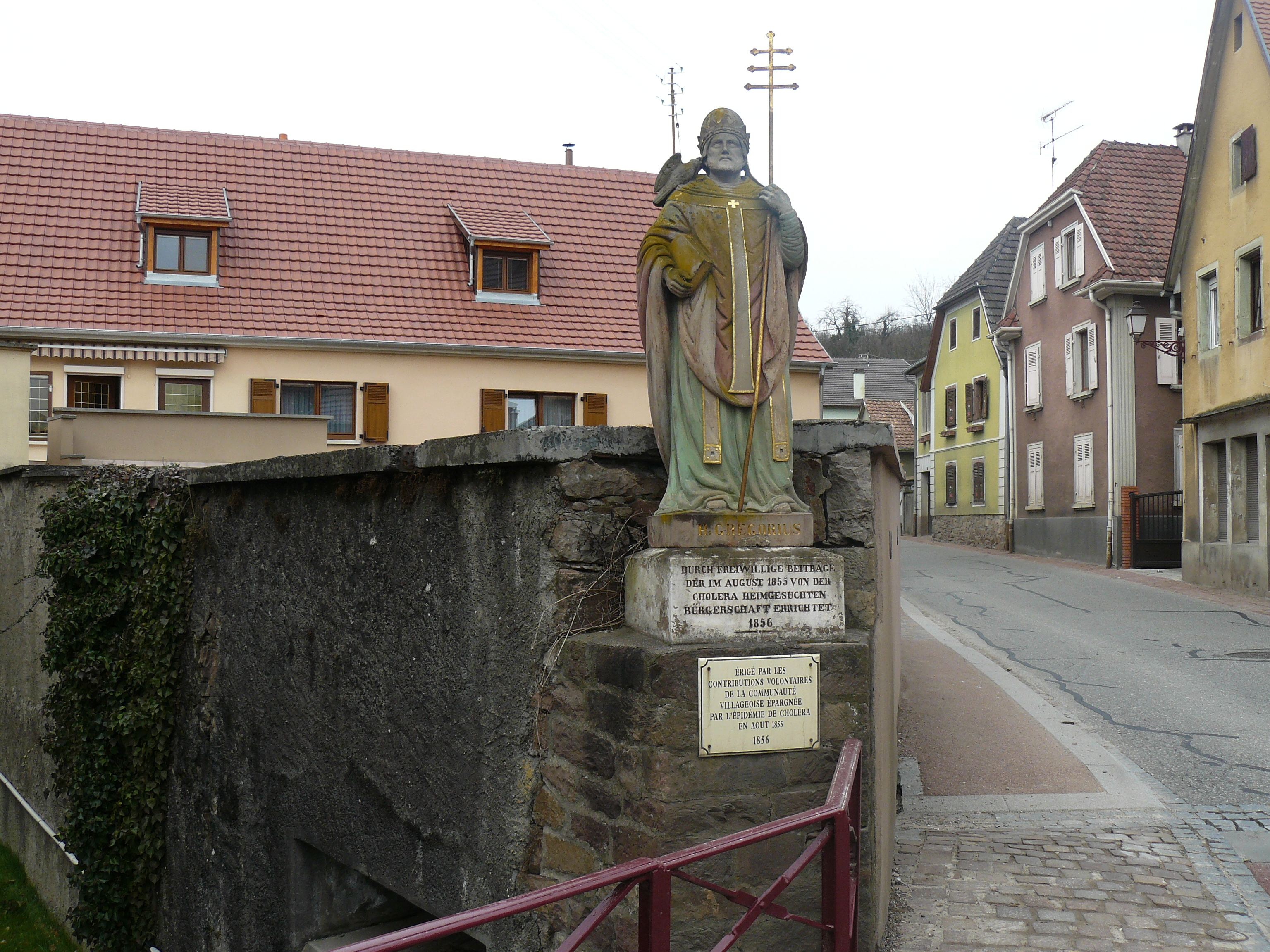 Statue de Saint-Grégoire à Soultzmatt